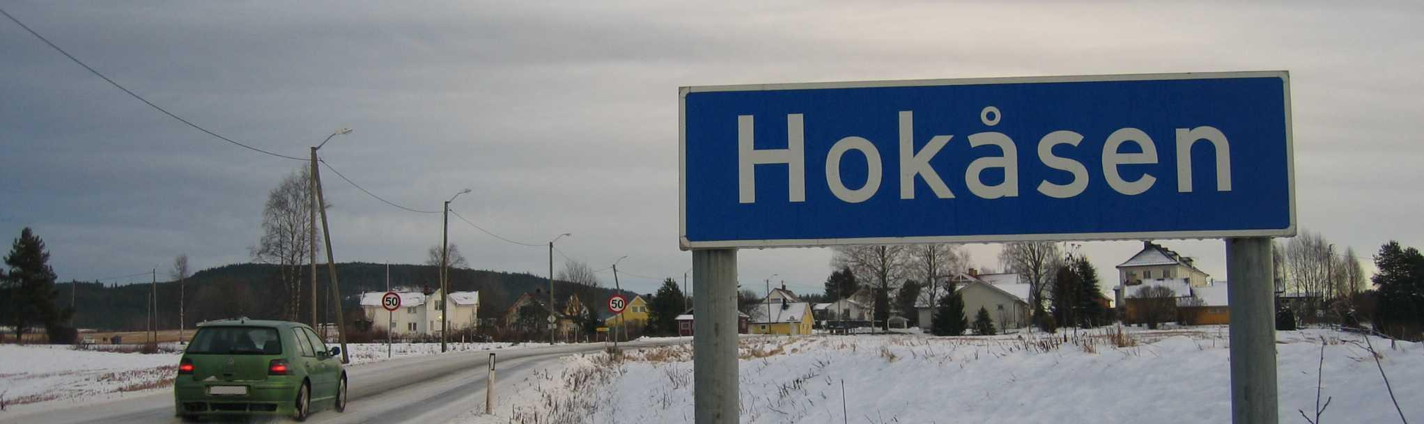 Hokåsen veiskilt desember 2005. Foto: Martin Høgberget 2005